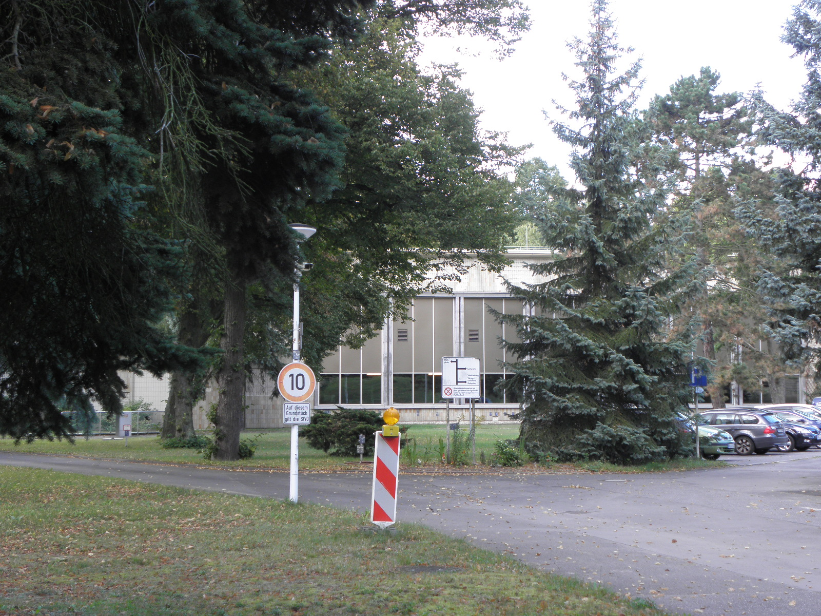 Pionierstraße